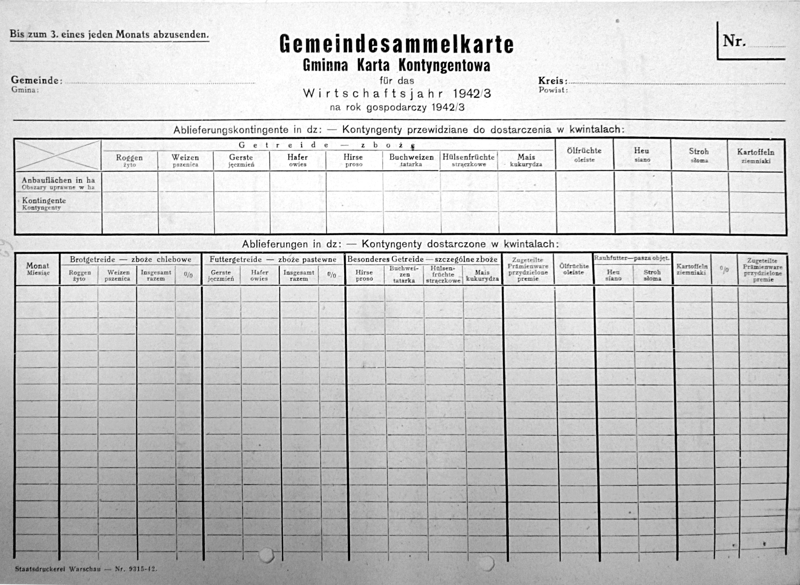 Karta kontygentowa z roku 1942, wprowadzona w Polsce okupowanej przez Niemców.